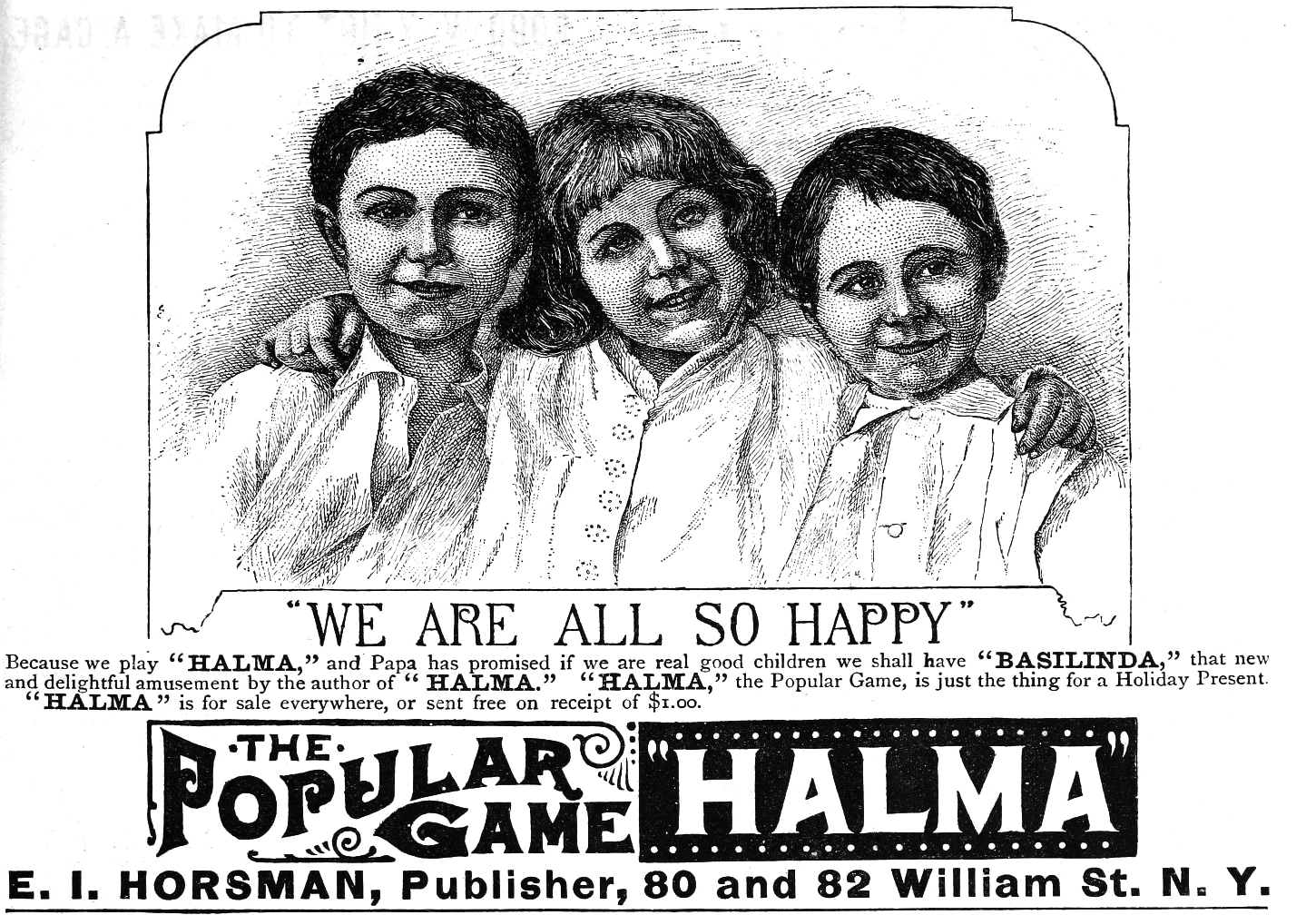 Halma game advertisement